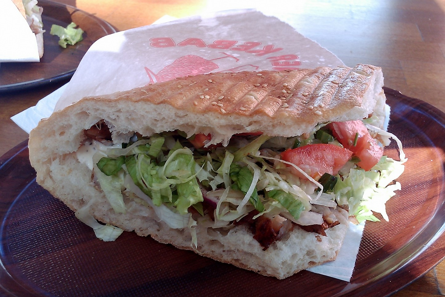 Döner Kebab, hier von einem türkischen Imbiss in Berlin, Deutschland.